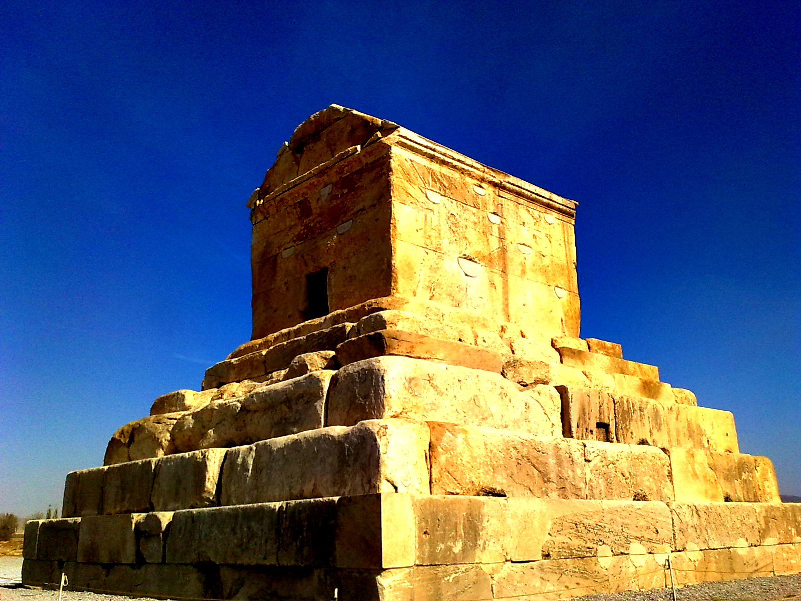 ابی